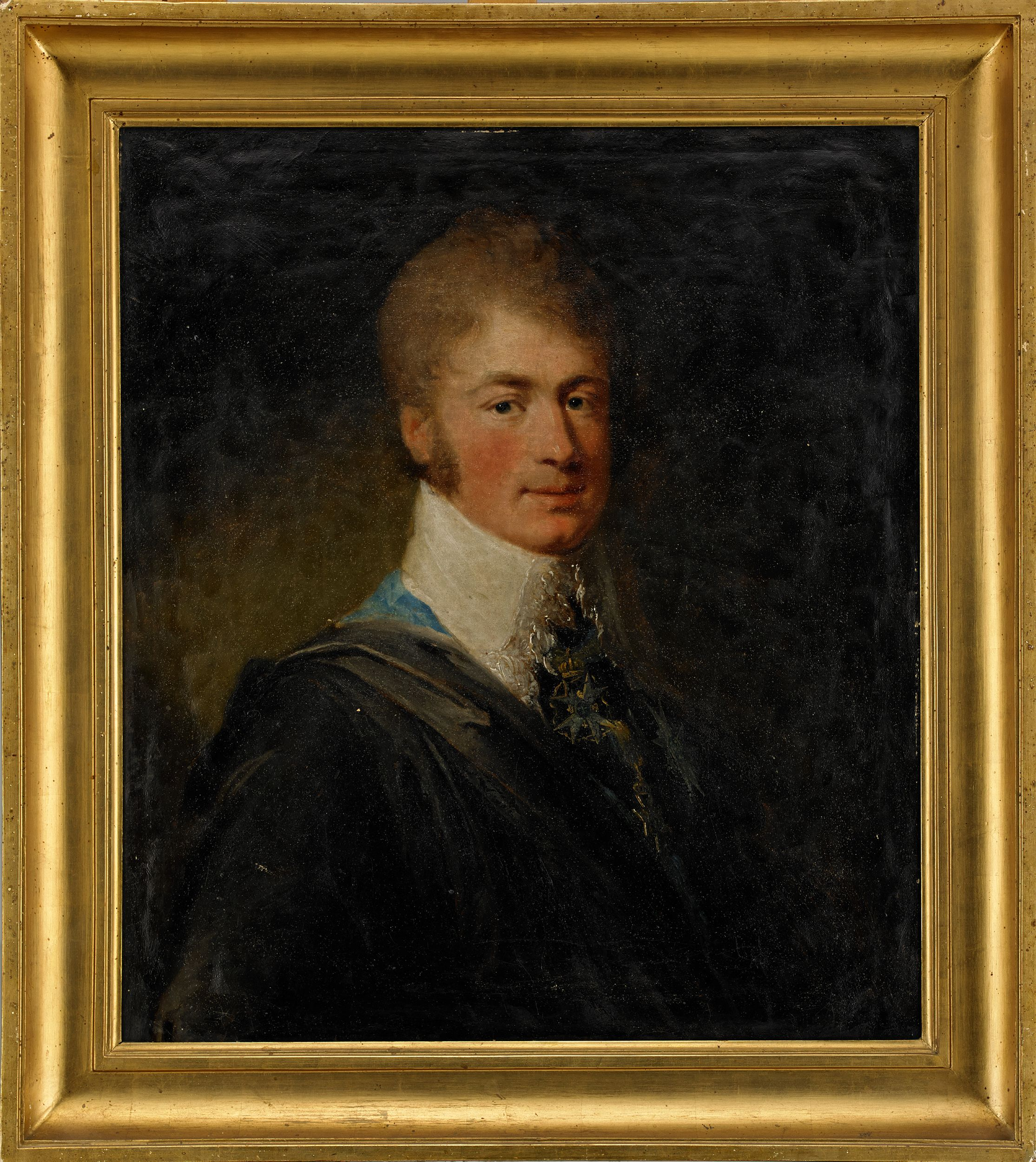 Porträtt av generallöjtnanten, kammarherren, greve Gustaf Fredrik Mörner af Morlanda, riddare af Svärdsorden, iklädd hovdräkt med svart sidenmantel och nedvikt spetskrage, bärandes svärdsordens stora kors och kraschan samt serafimerordens ordenstecken - bröstbild Signerad och daterad C. F. von Breda pinx 1805. Olja på duk, 73 x 63 cm. Proveniens: Greve Gustaf Fredrik Mörner af Morlanda (1768-1841) dennes dotter friherrinnan Constance Augusta Leijonhielm (1801-30), née grevinna Mörner af Morlanda dennes son friherre Carl Gustaf Leijonhielm (1820-76), Svartå bruk, Närke dennes son friherre Carl Henrik Leijonhielm (1854-1932), Svartå bruk, Närke